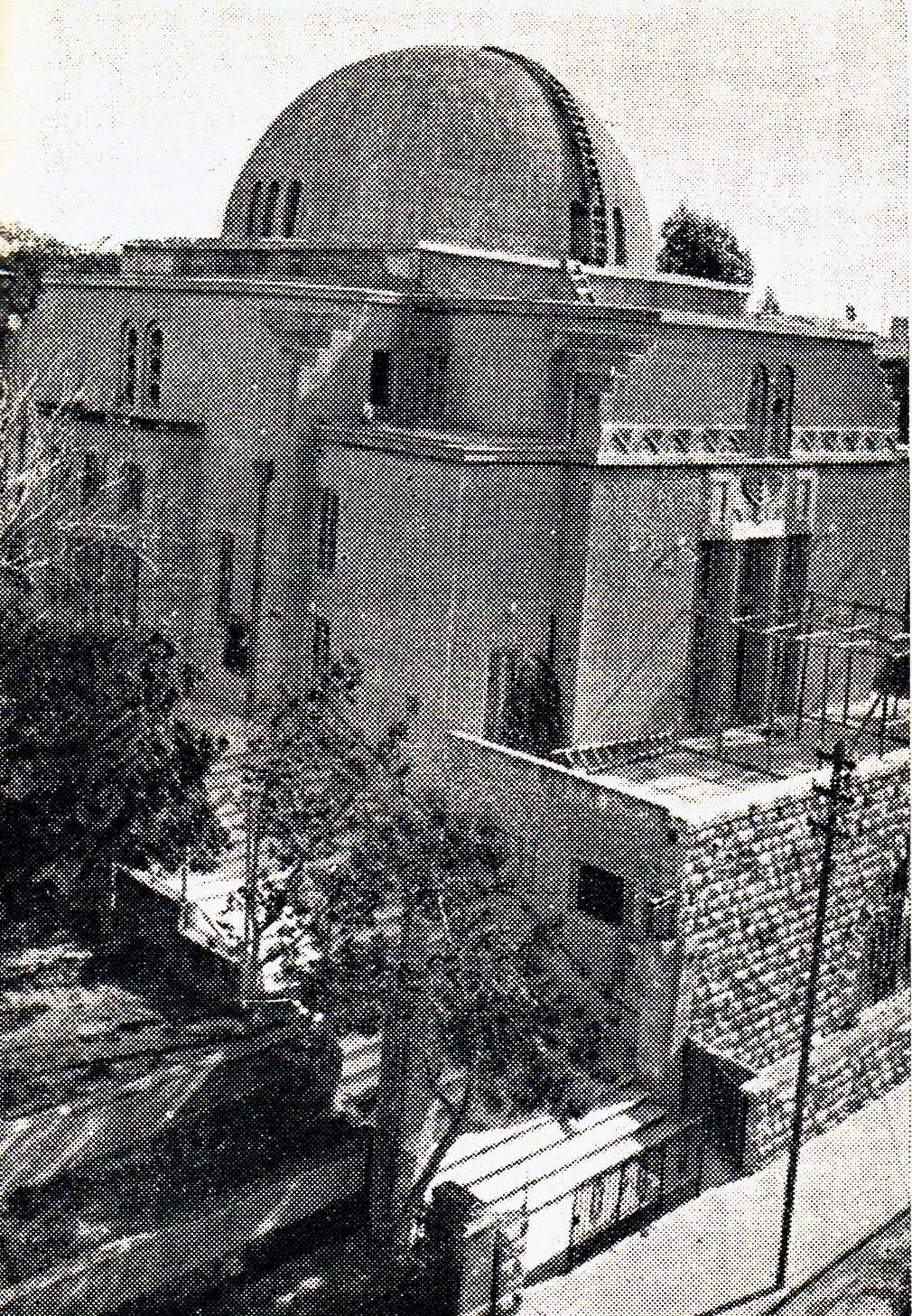 בית כנסת 'אוהל מועד'